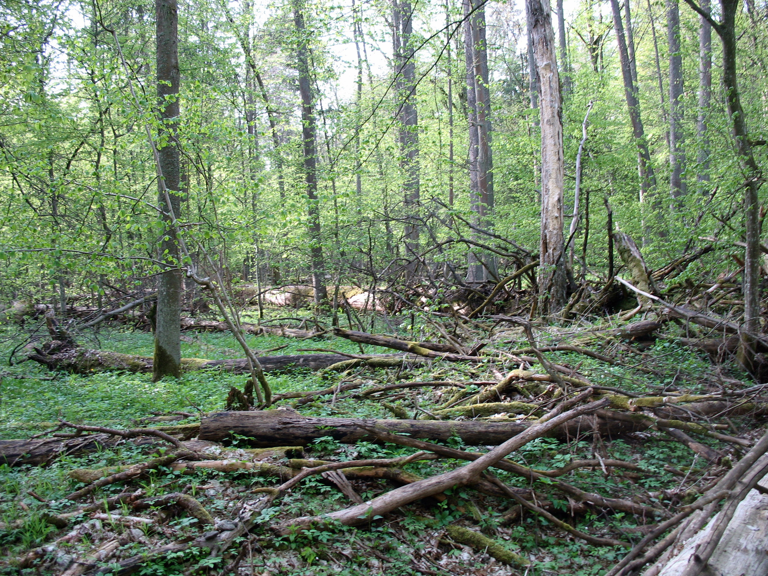 Rezerwat ścisły w Puszczy Białowieskiej